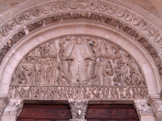 Portaal van de Kathedraal van Autun